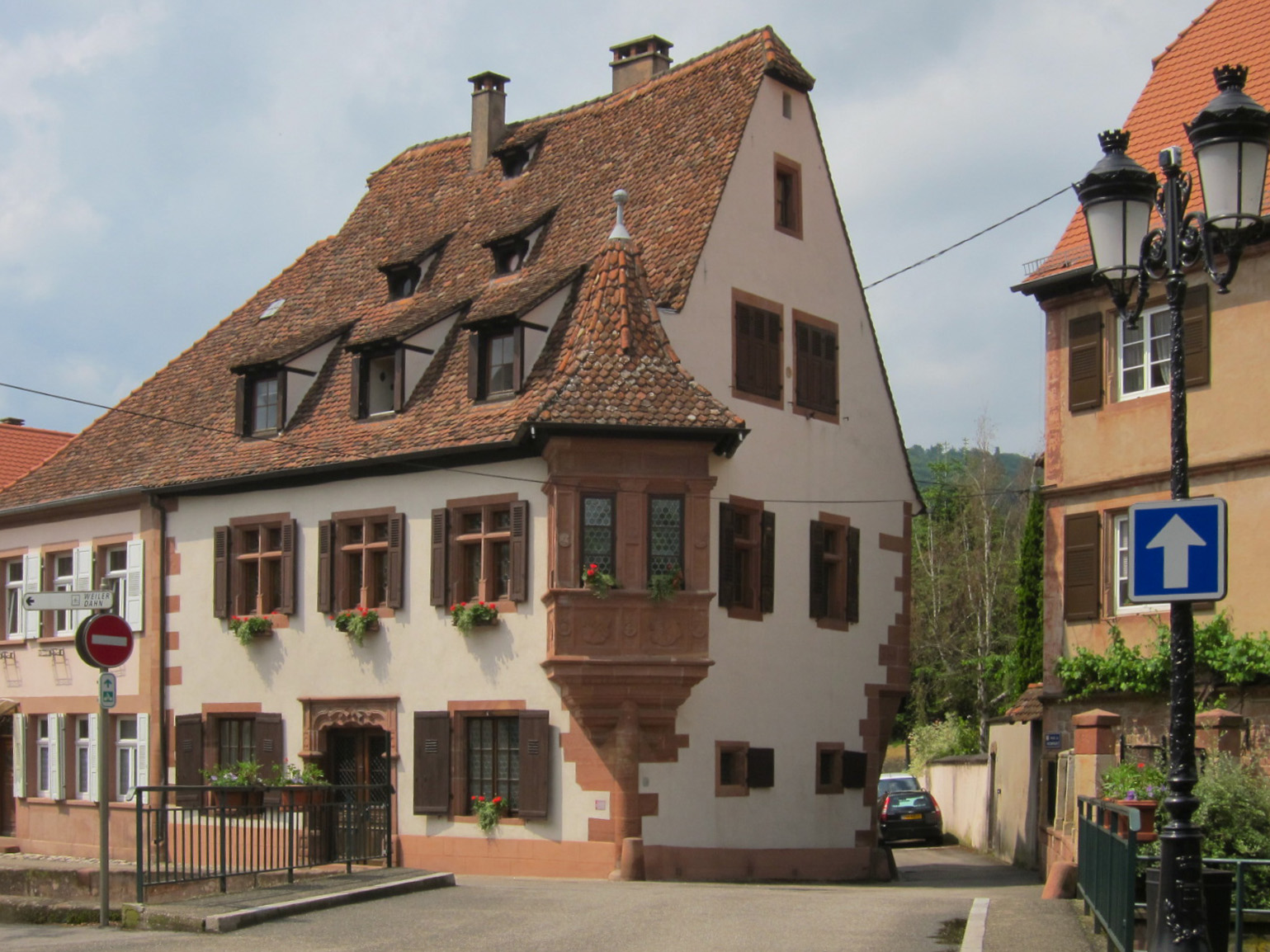 Alsace